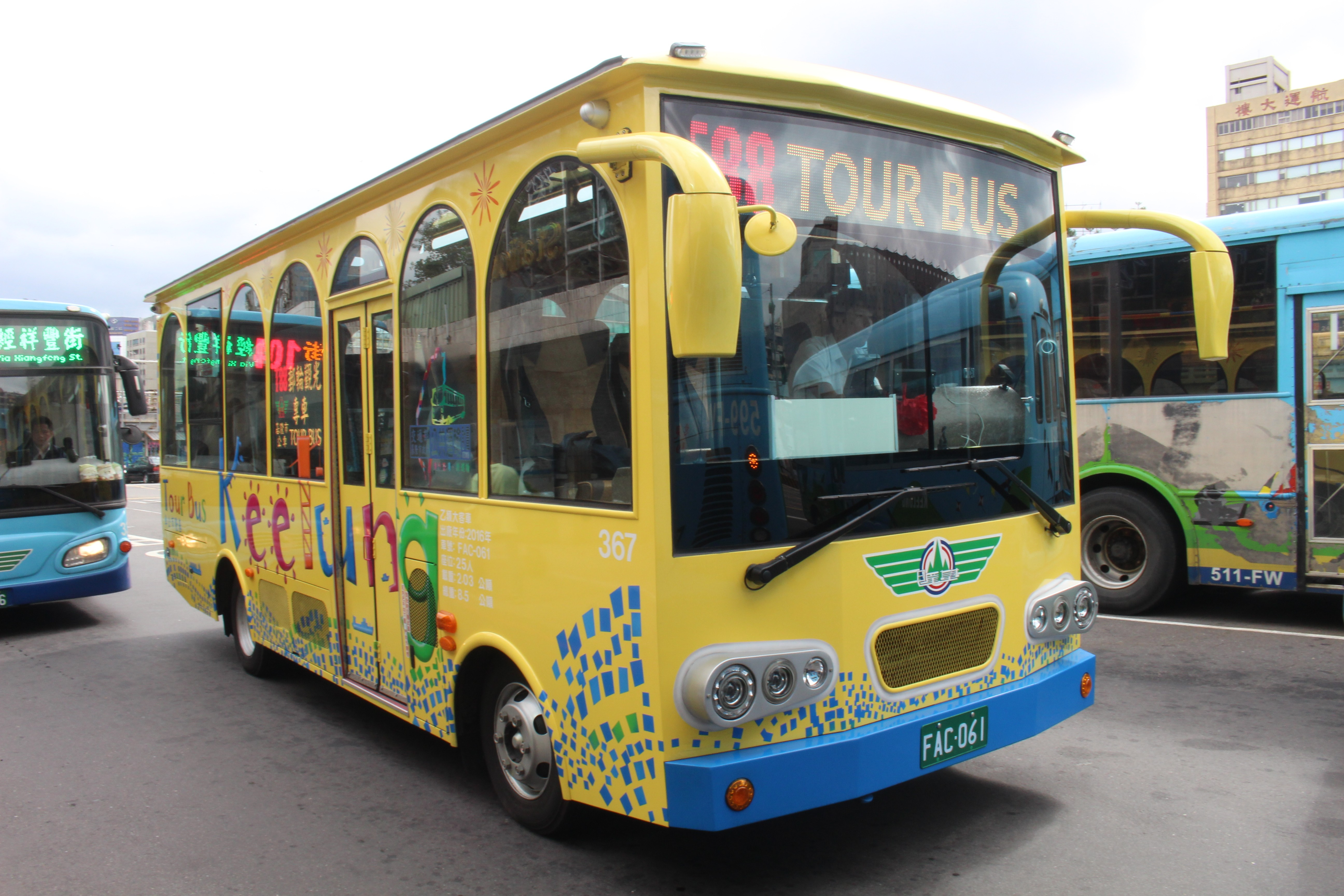 中文（台灣）: 基隆市公車處五十鈴NQR90KMB5大客車FAC-061行駛T88線